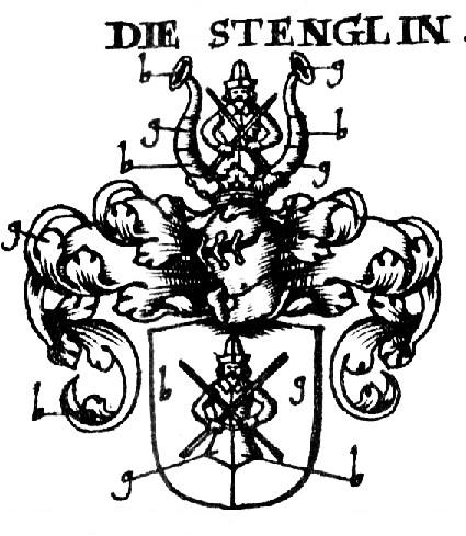 Wappen der alten schwäbischen Patrizierfamilie Stenglin